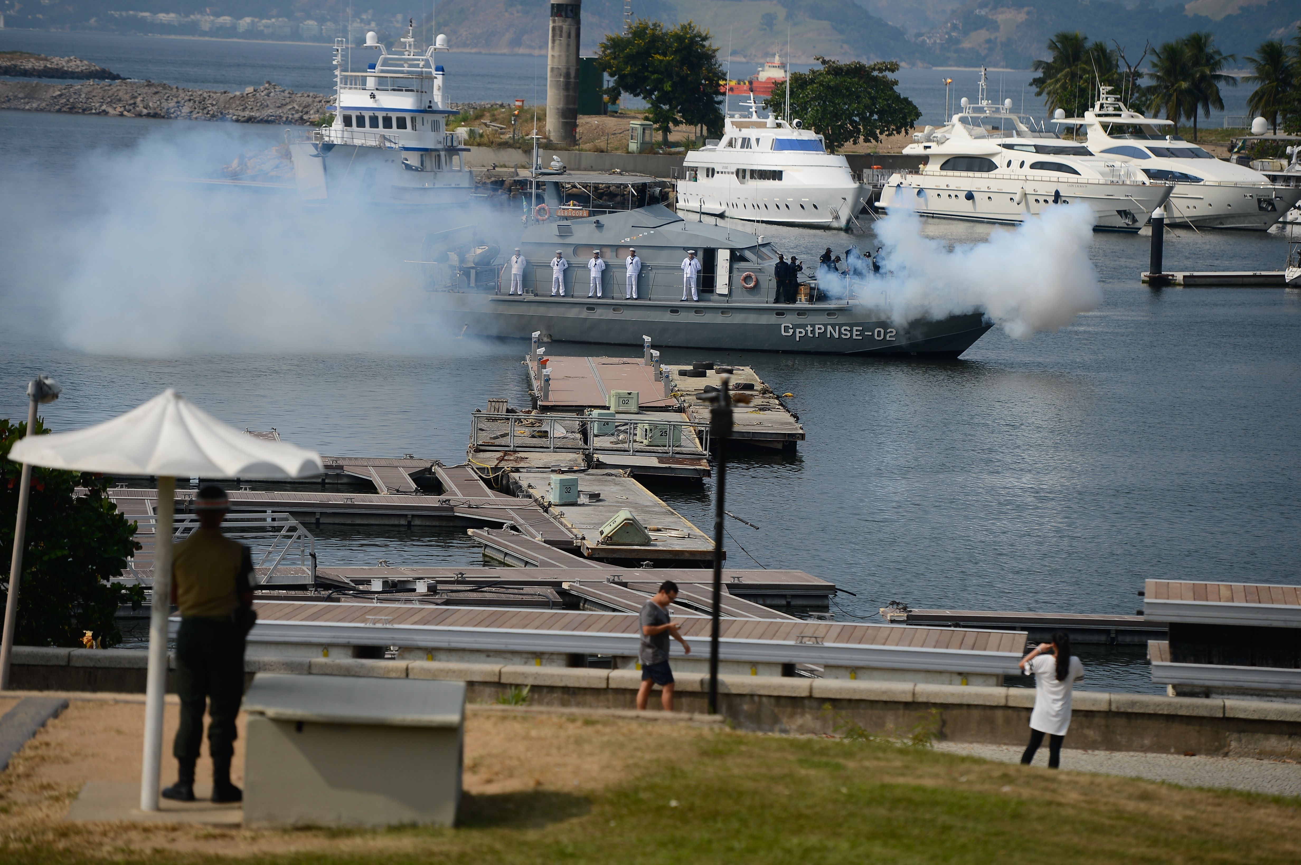 Rio de Janeiro - Marinha realiza salva de tiros durante cerimônia de entrega da Medalha da Vitória, no Monumento Nacional aos Mortos da Segunda Guerra Mundial, no Aterro do Flamengo (Tomaz Silva/Agência Brasil)